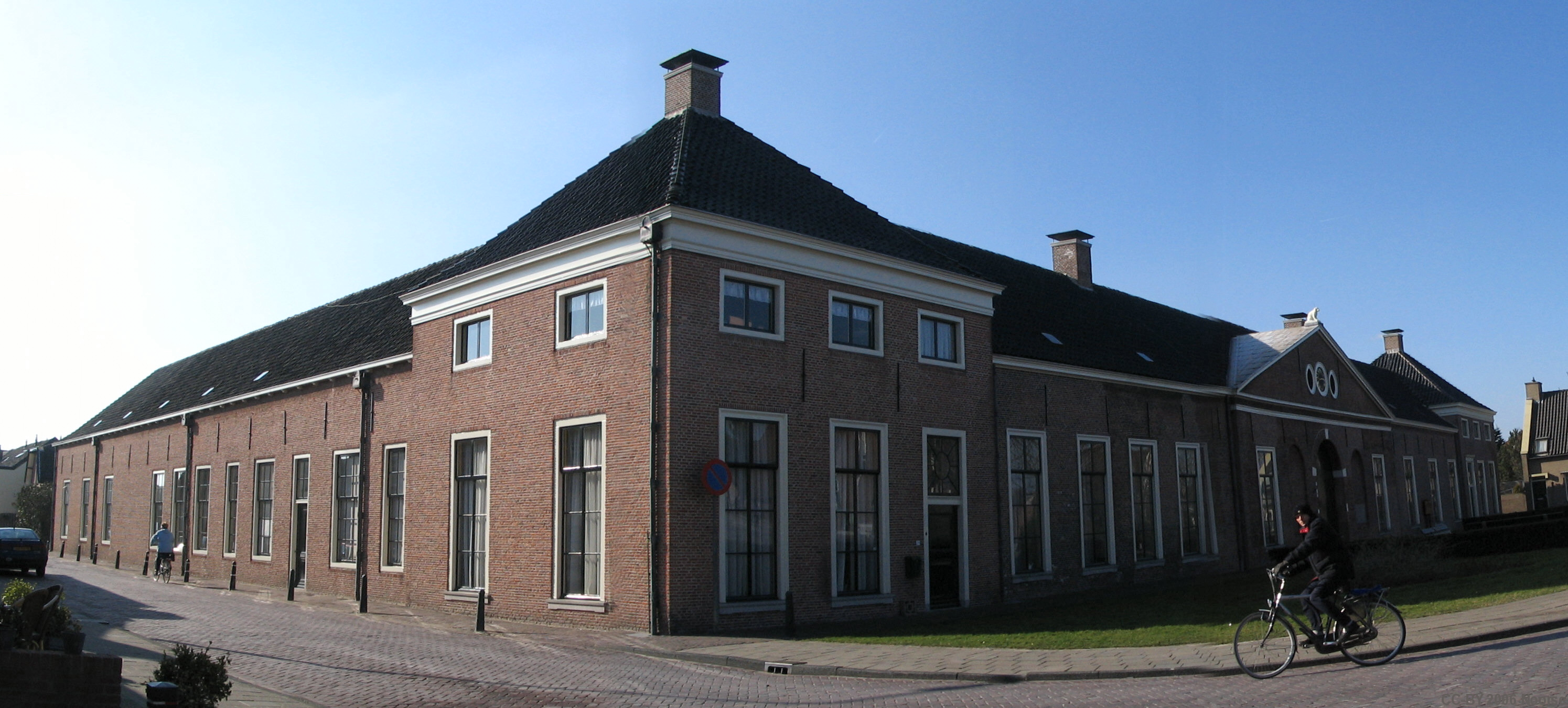 Huis Honselersdijk te Honselersdijk - foto gemaakt door Noorse, vrijgegeven onder CC-BY-2.5 Categorie:Afbeelding gemeente Westland Dit is niet her originele Huis Honselersdijk, maar de Nederhof. Dat is het 'dienstgebouw' dat plaats bood aan stallen en personeel. Het oorspronkelijke Huis Honselersdijk, een van de mooiste Paleizen van Frederik Hendrik, is begin 19e eeuw afgebroken.